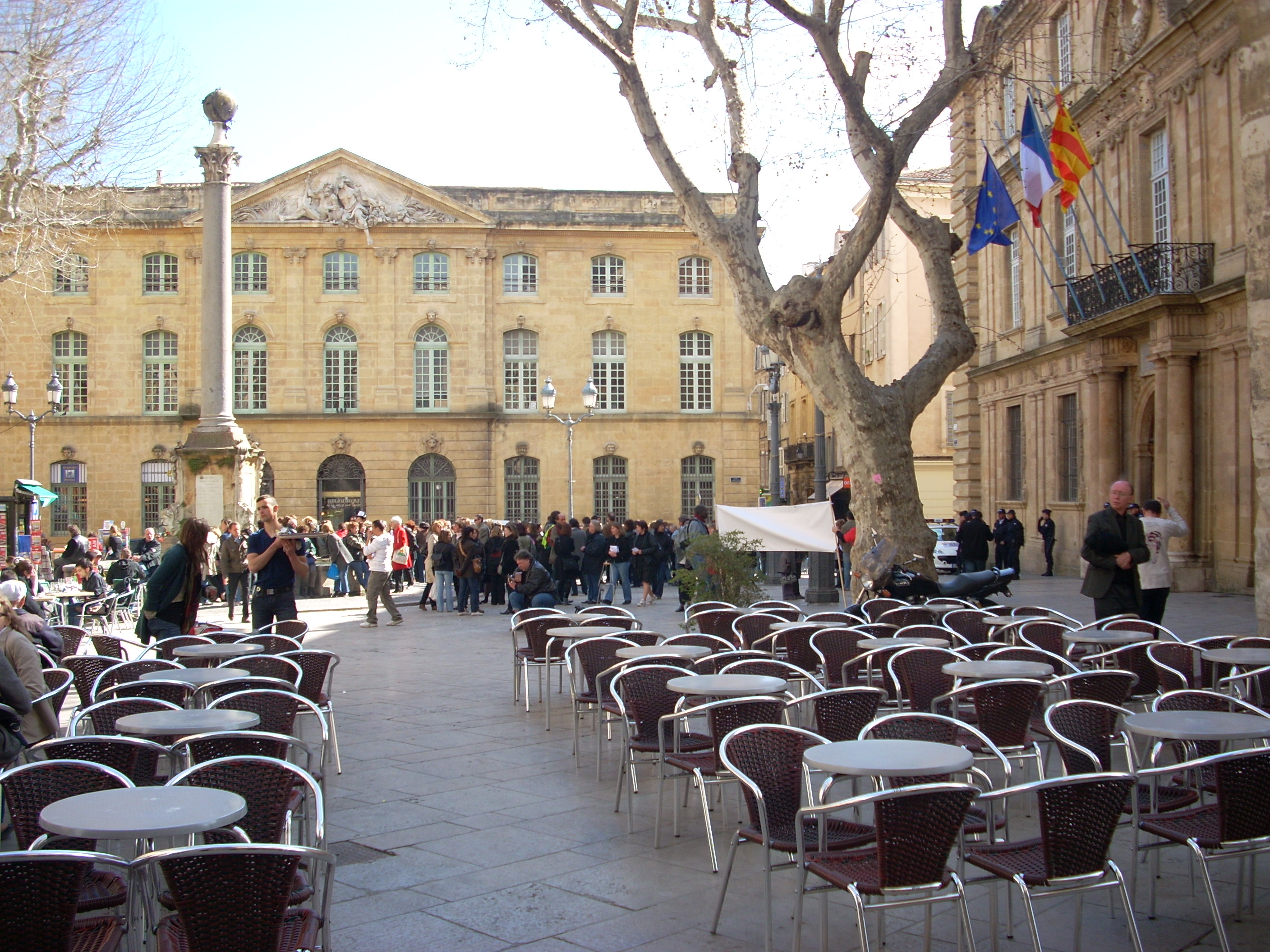 Aix en Provence